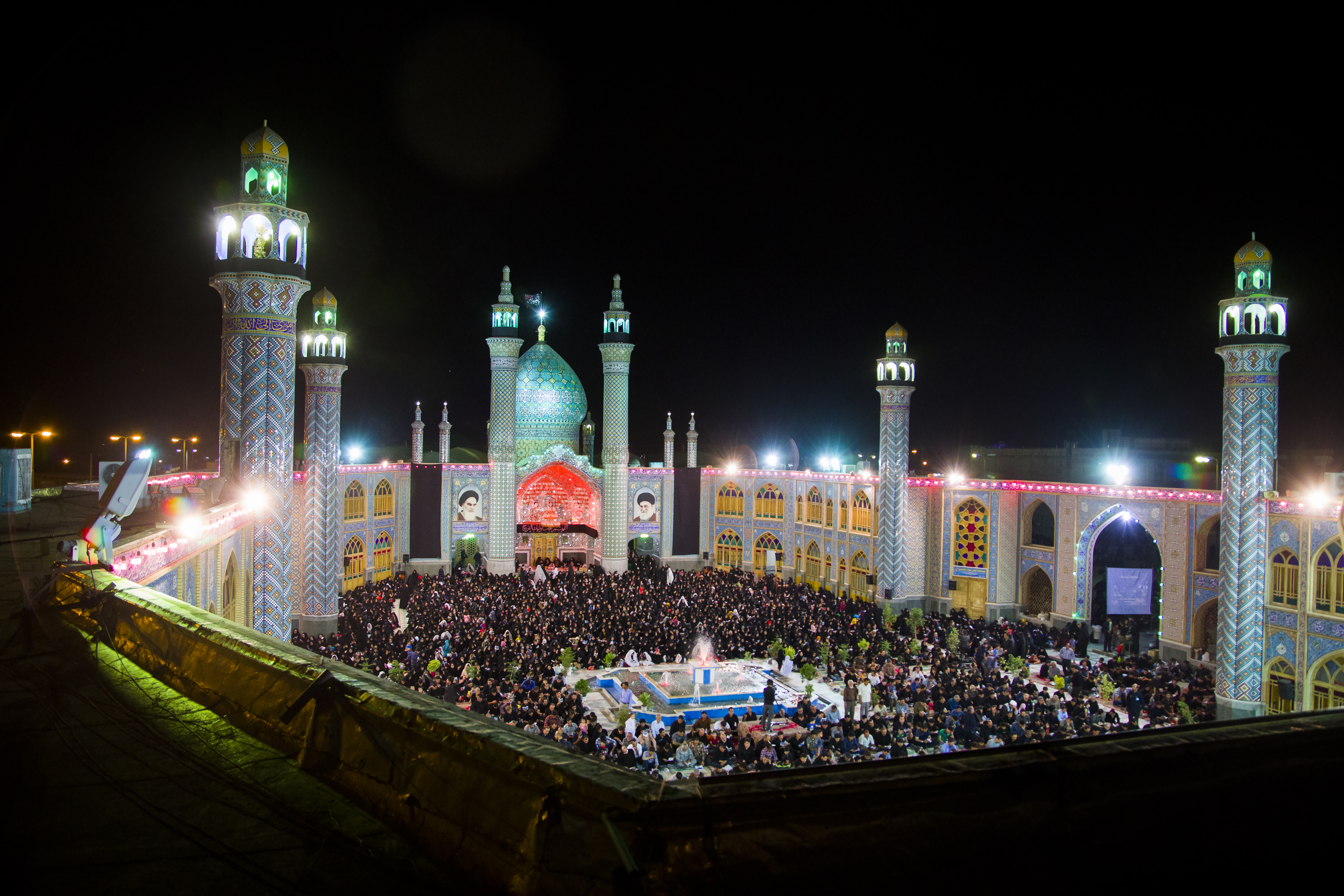 محمد اوسط مشهور به هلال علی و محمد هلال، (۱۴–۶۴ ه. ق)، فرزند بلافصل علی بن ابیطالب و نوه محمد می‌باشد.مقبره این امامزاده در شهرستان آران و بیدگل می باشد.